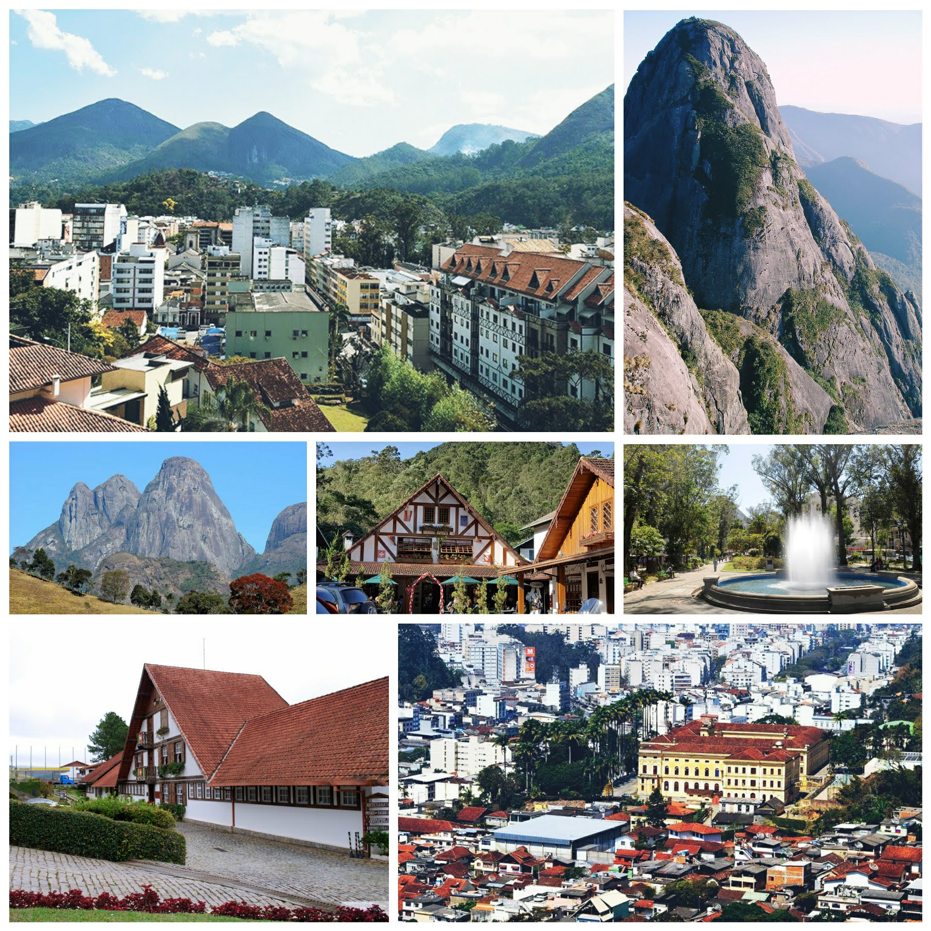 Pontos de interesse de Nova Friburgo